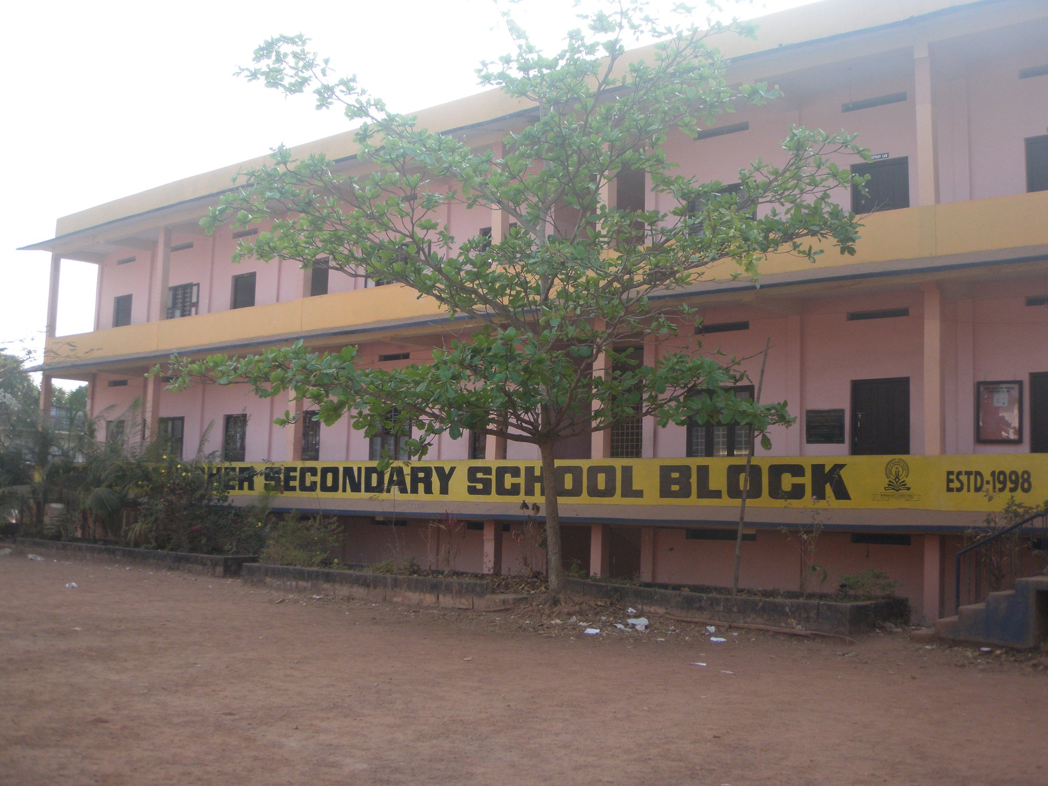 മമ്പറം ഹയര്‍സെക്കന്‍ഡറി സ്കൂള്‍